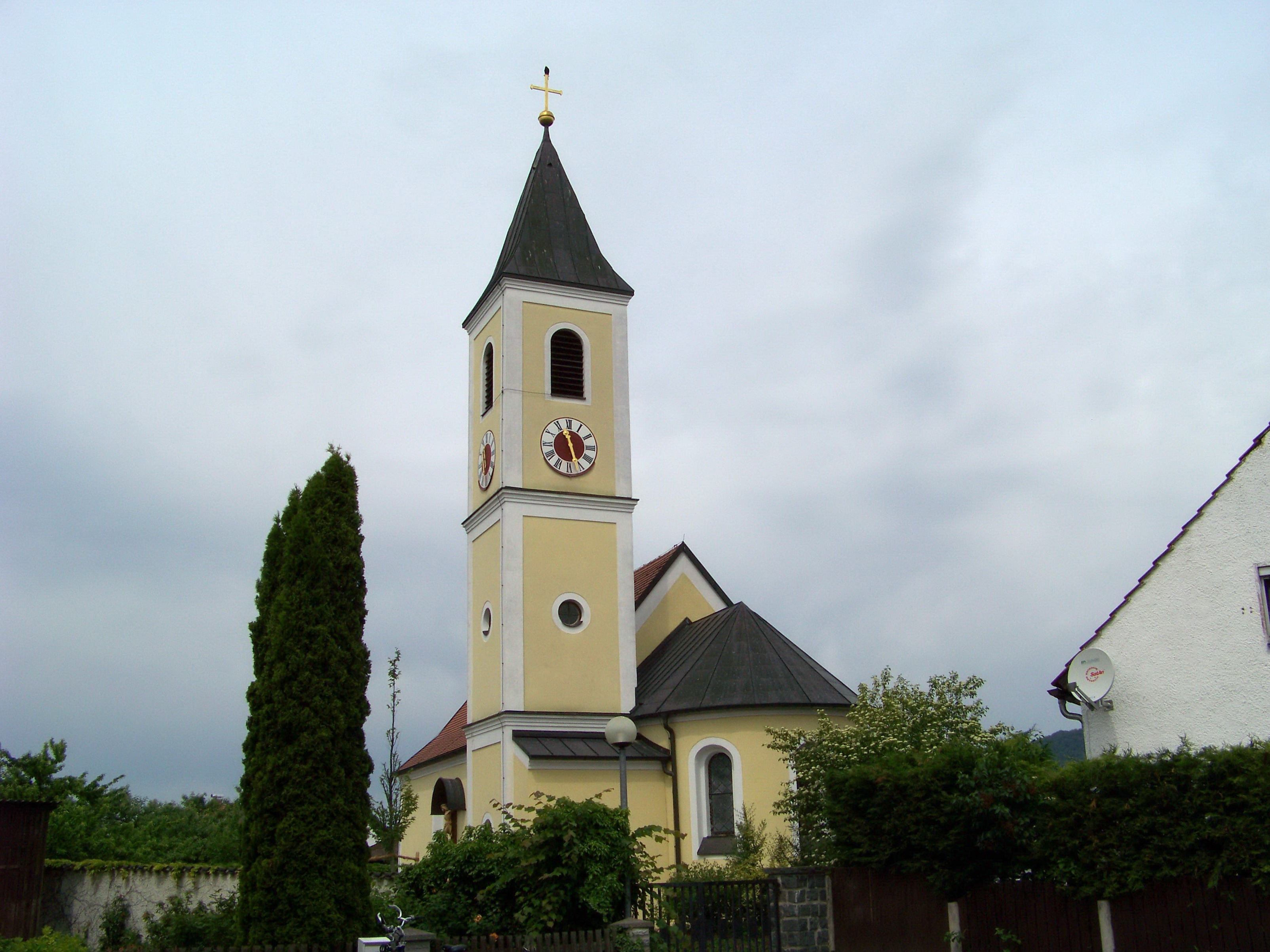 Bach an der Donau. Demling, Austraße 39. Katholische Filialkirche St. Andreas, Saalbau mit eingezogenem Chor und Flankenturm mit Zwiebelhaube und Putzgliederungen, 17. Jahrhundert, 1990/91 erweitert; Friedhofsmauer, barock.